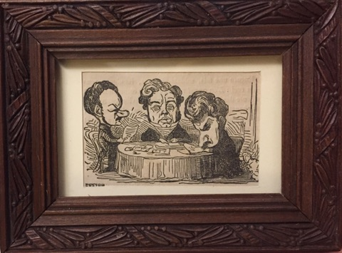 Les trois directeurs du Charivari en 1830-1840